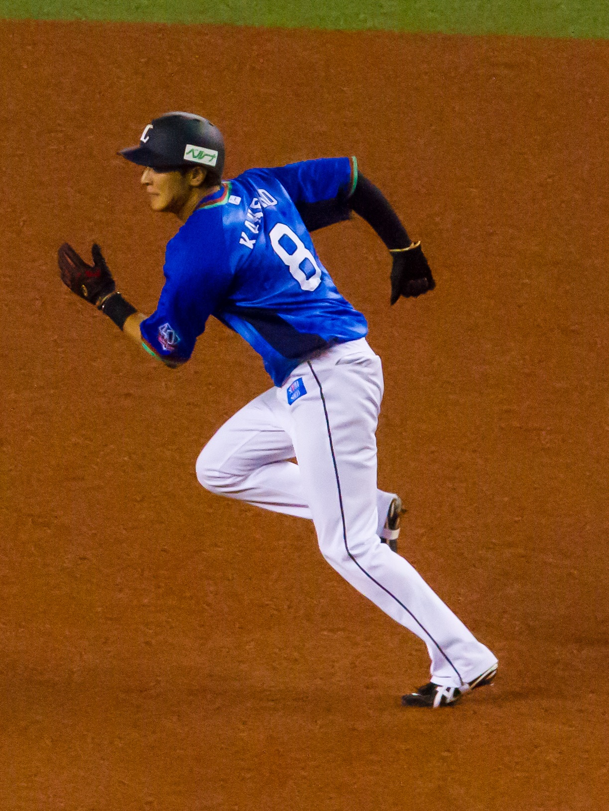 埼玉西武ライオンズ投手の金子侑司。